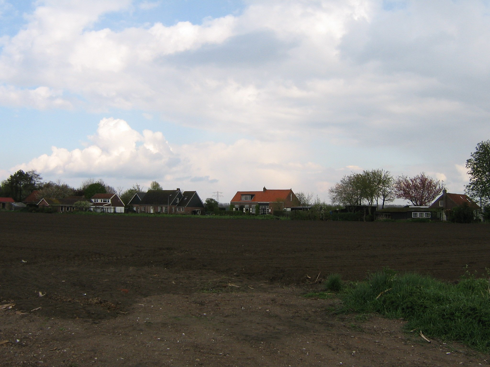 De Gosvazze bie 't Lewedurp. De Graszode, buurtschap bij Lewedorp, Zeeland. Graszode neighbourhood near Lewedorp, Borsele community, Netherlands.